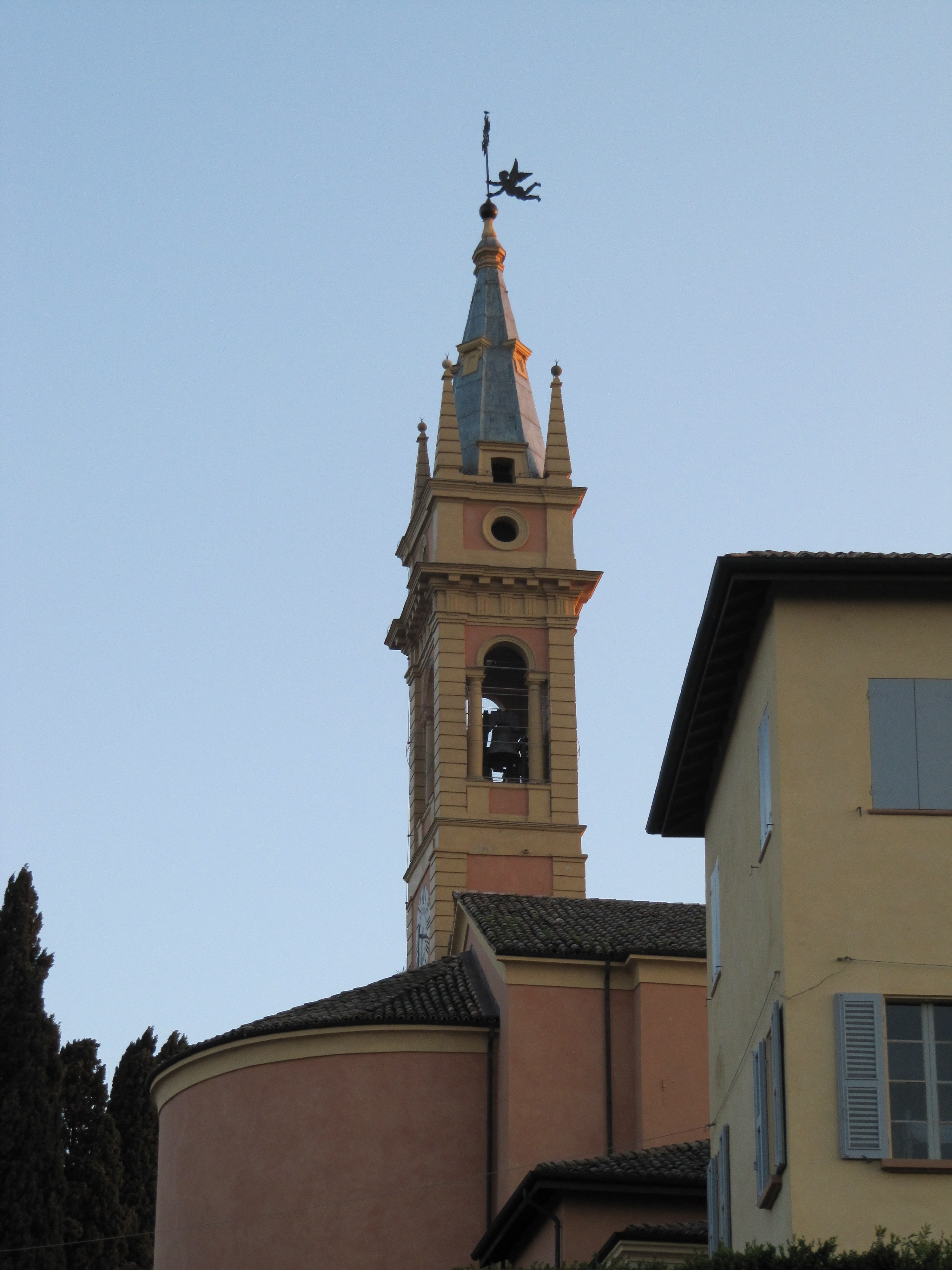 Particolare del campanile della Pieve di Albinea